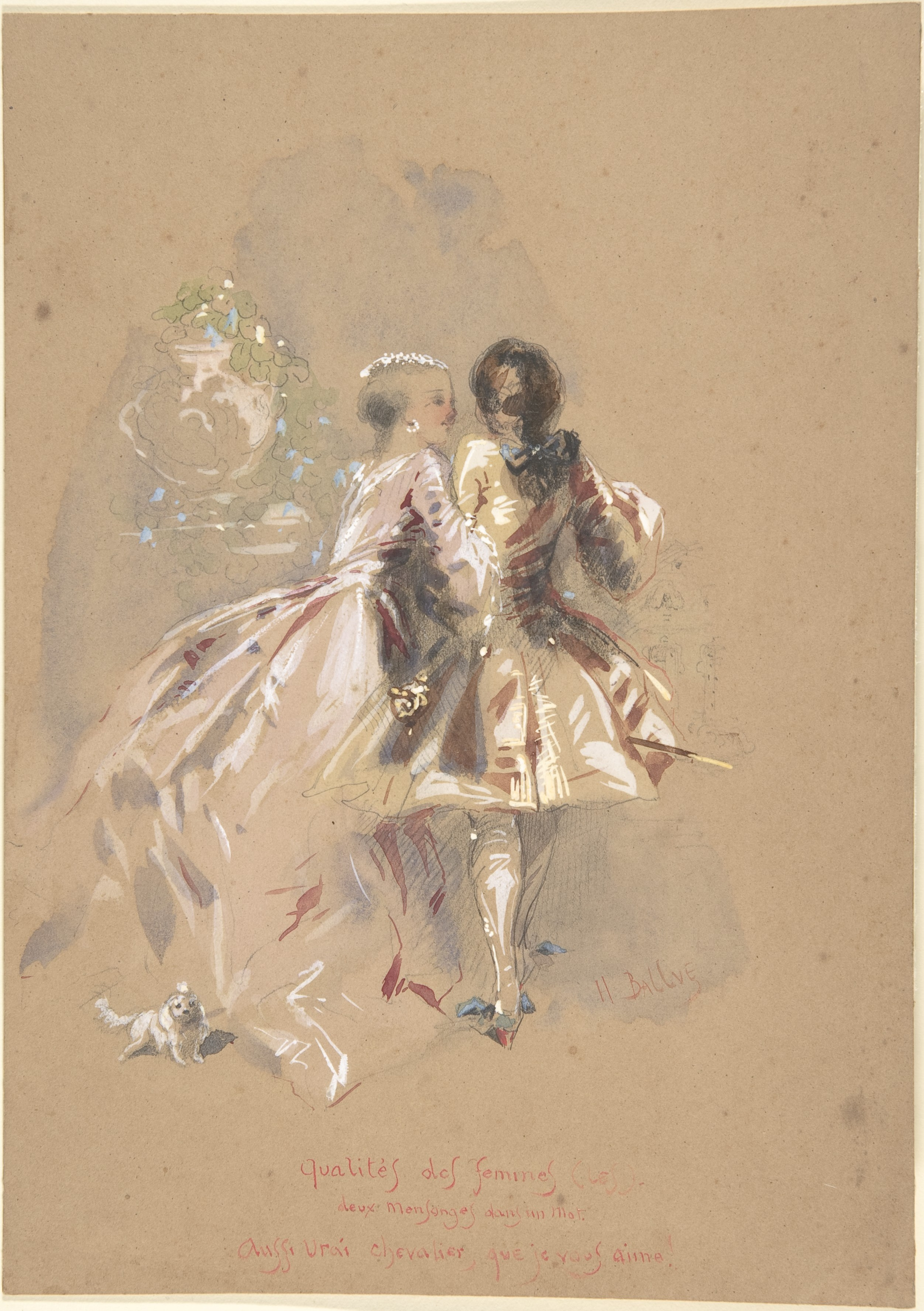 Drawing; Drawings